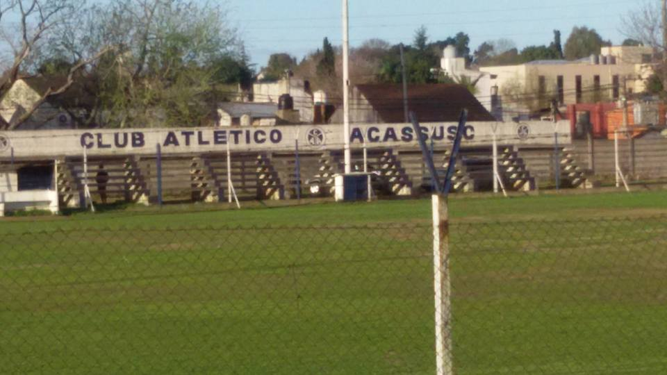 Vista a la tribuna del estadio